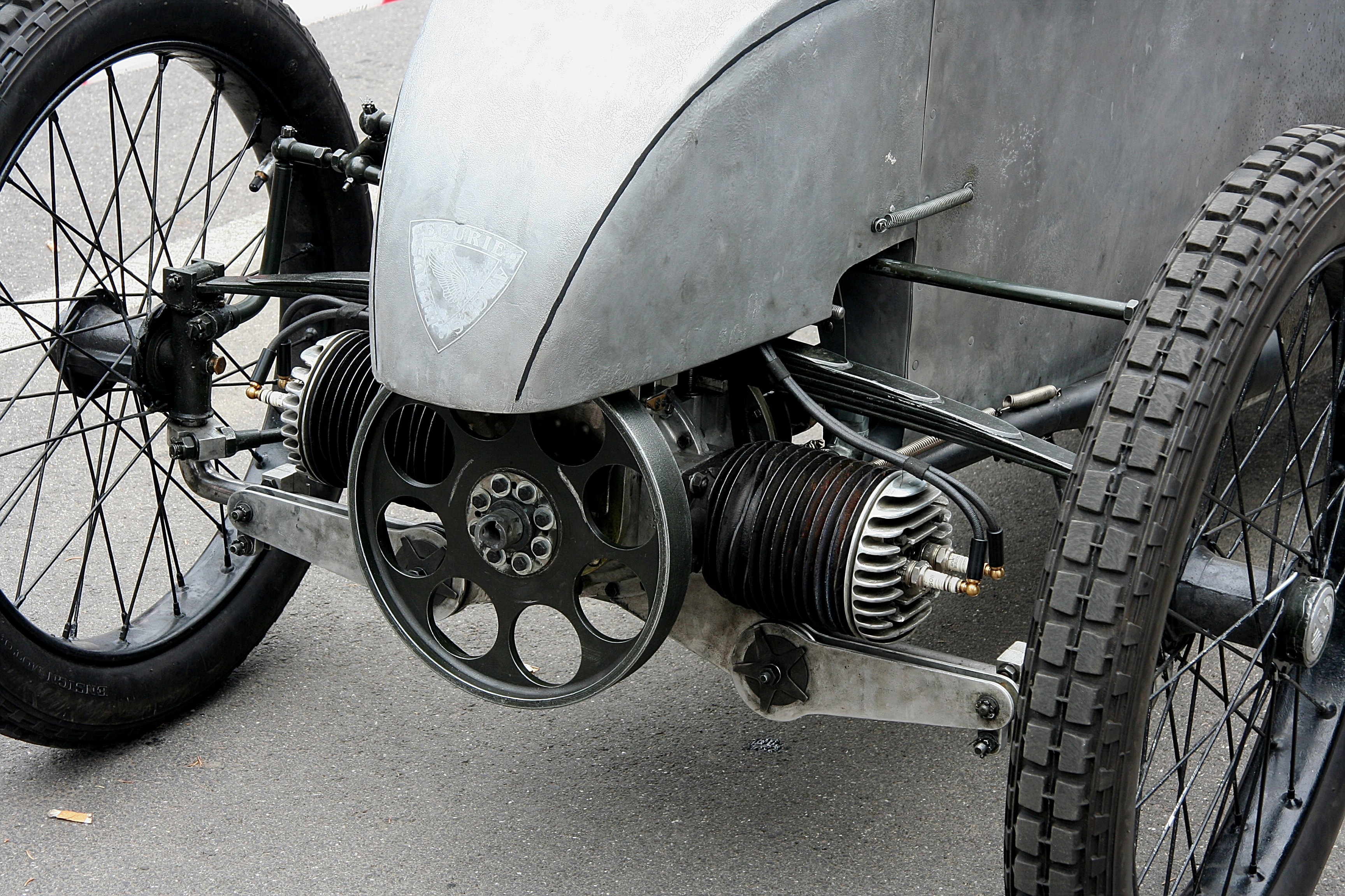 Zweitaktboxermotor im Sima-Violet 1924, 496 cm³